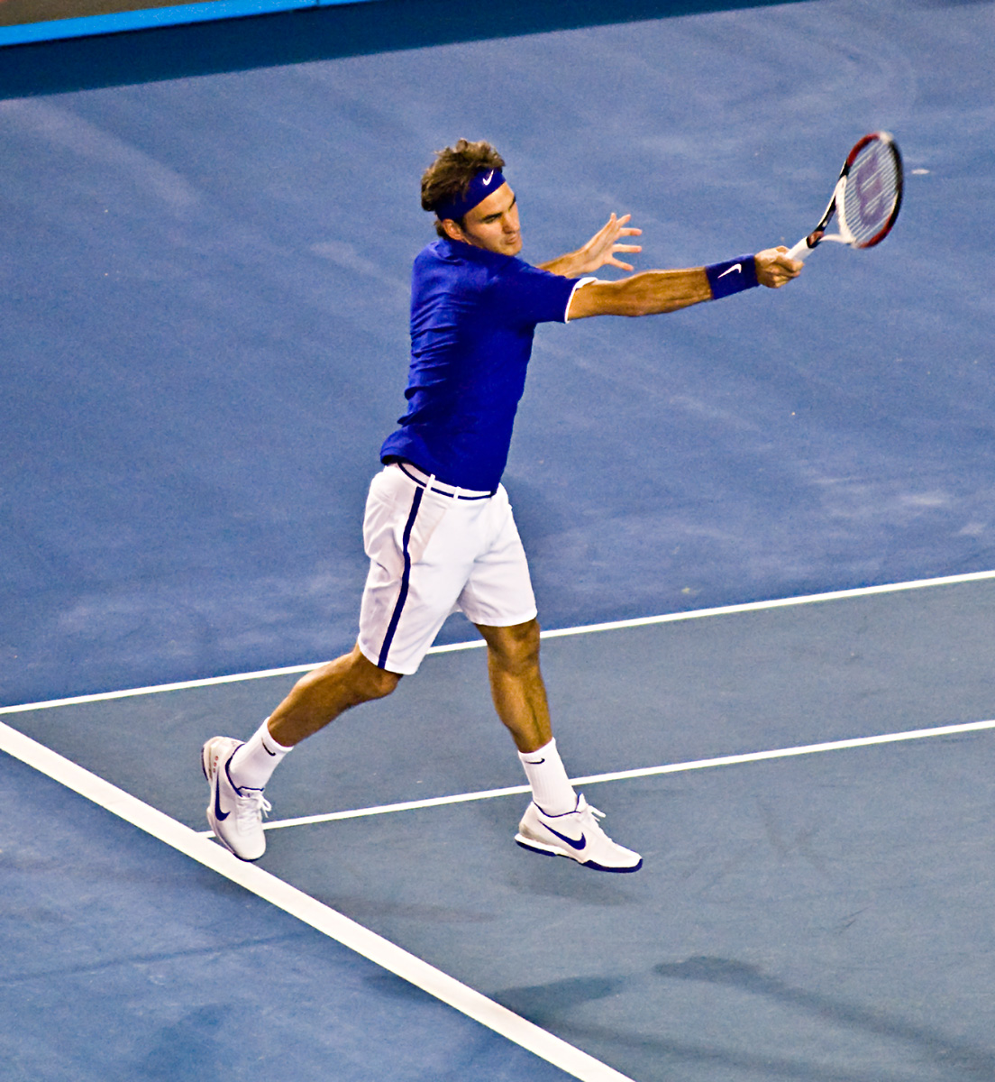 Federer